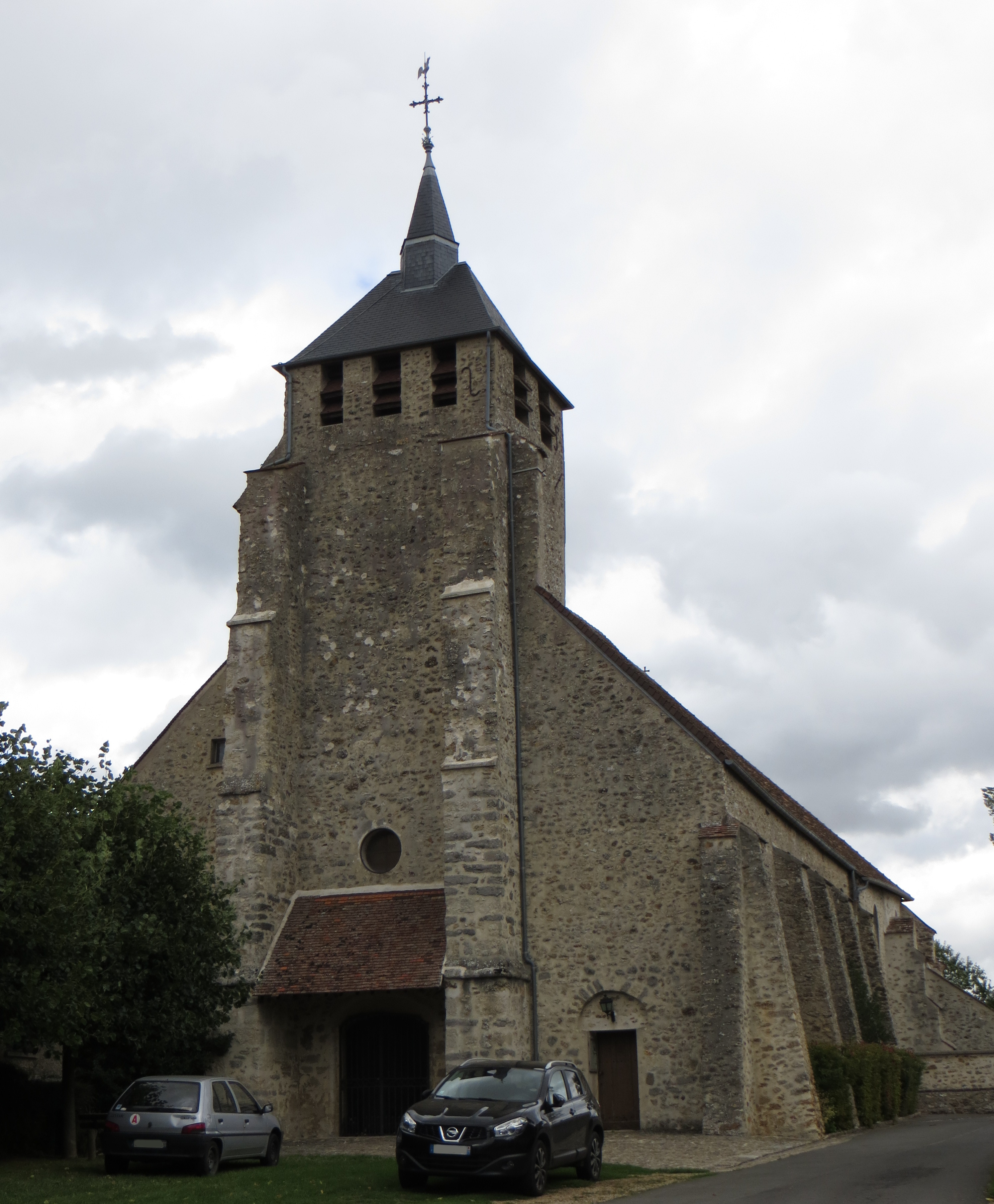 Vue de l'église